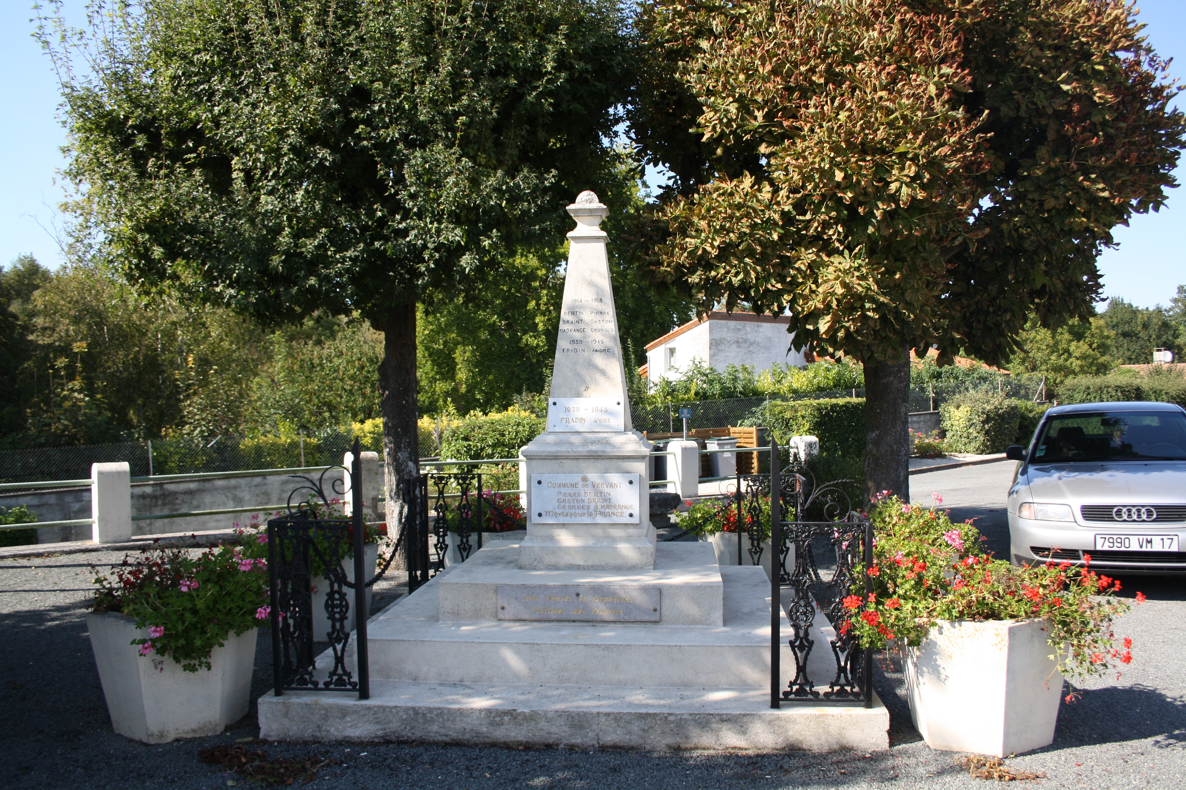 Monument aux morts de Vervant, Charente-Maritime (France).